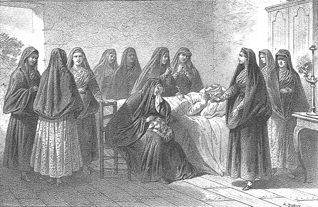 Voceru